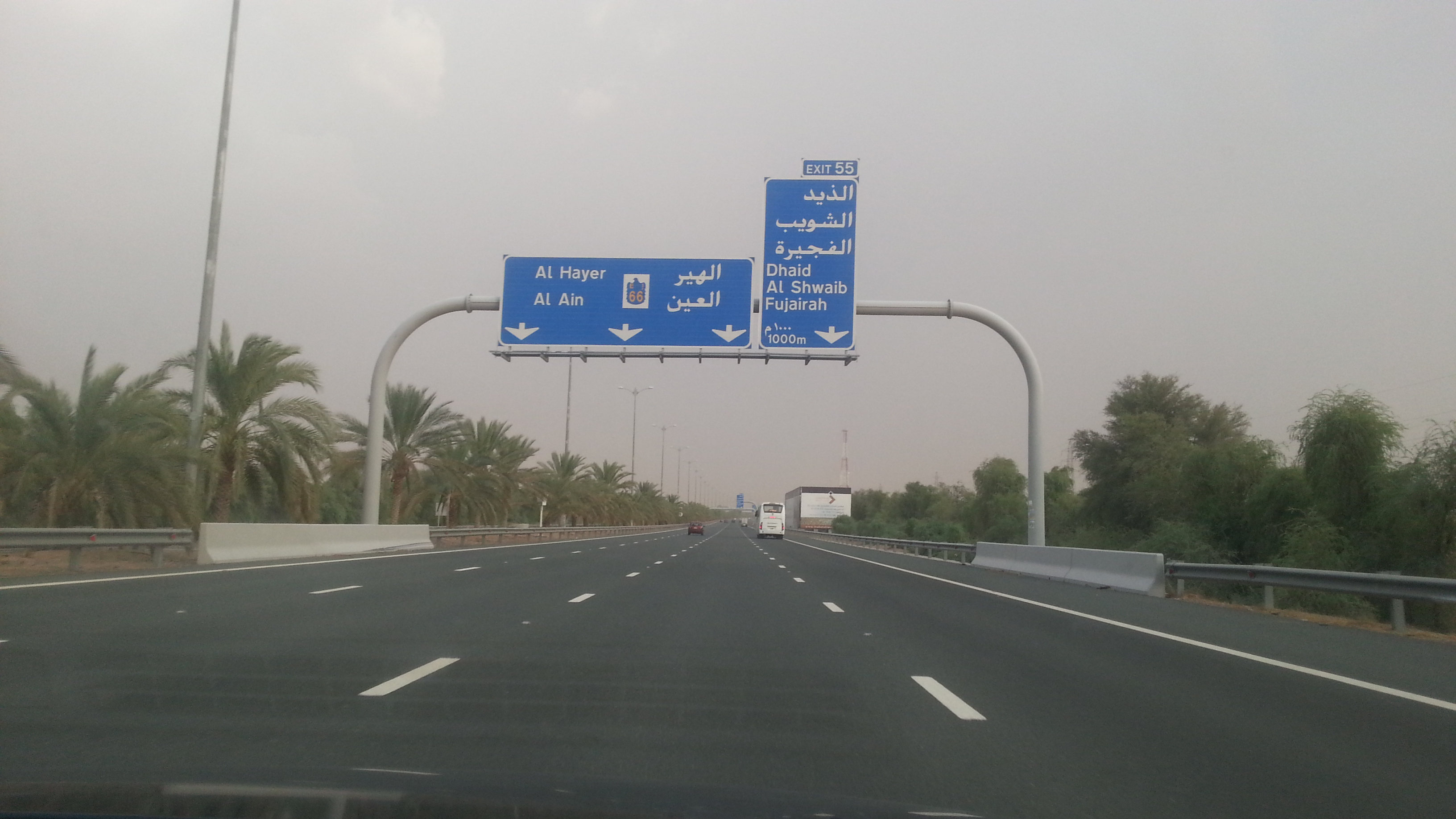 Dubai Alain road UAE